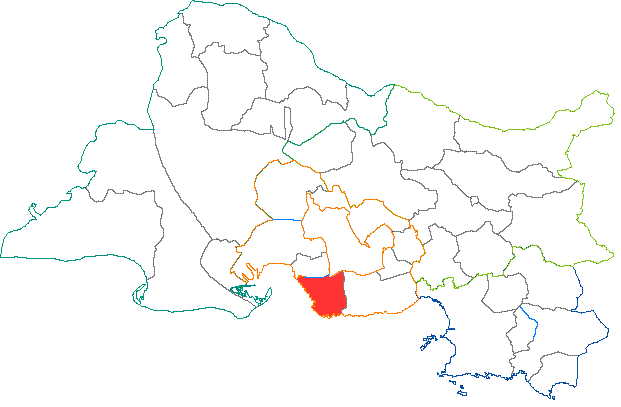 Situation du canton dans le département des Bouches du Rhône (France)